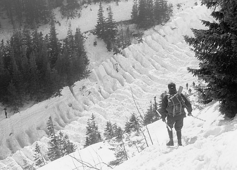 Lawinisko w Białym Jarze po lawinie